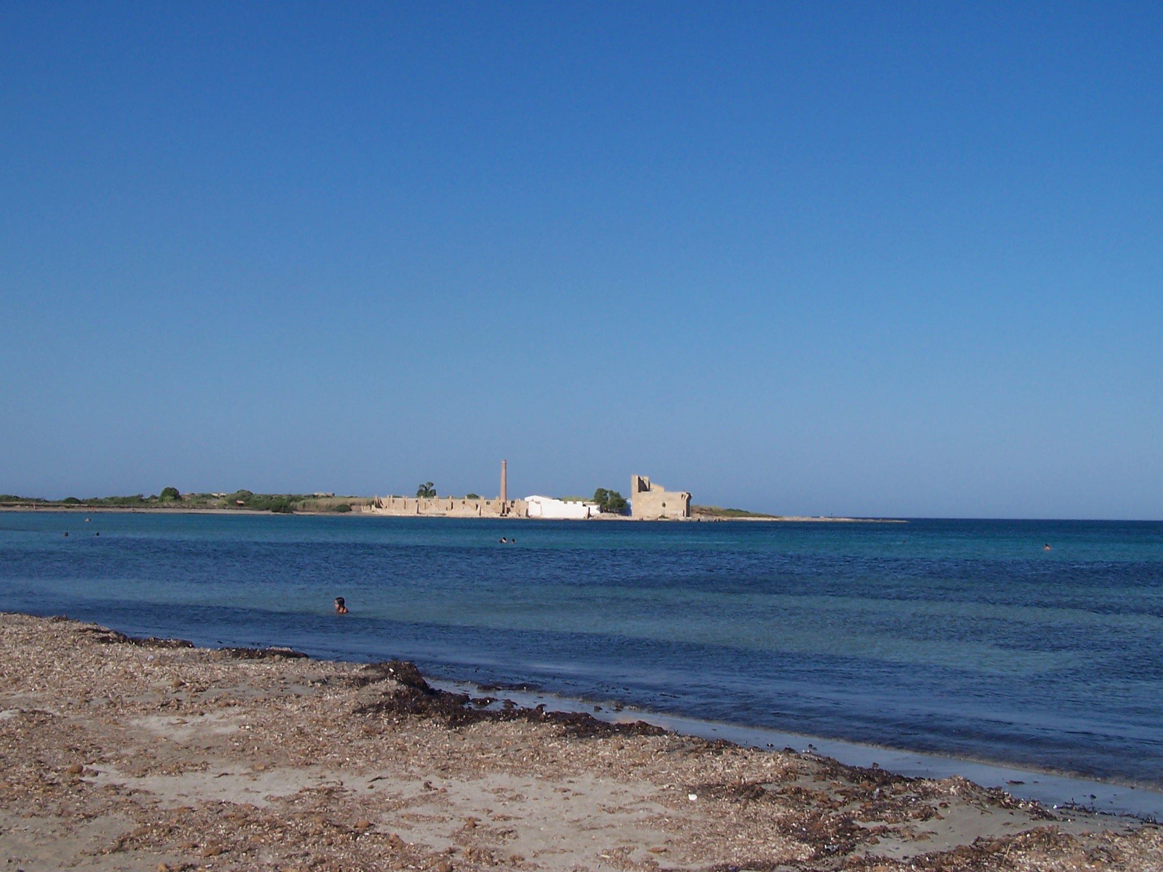 Le rovine della tonnara e la torre aragonese (sec. XV) della Riserva naturale di Vendicari a Siracusa.